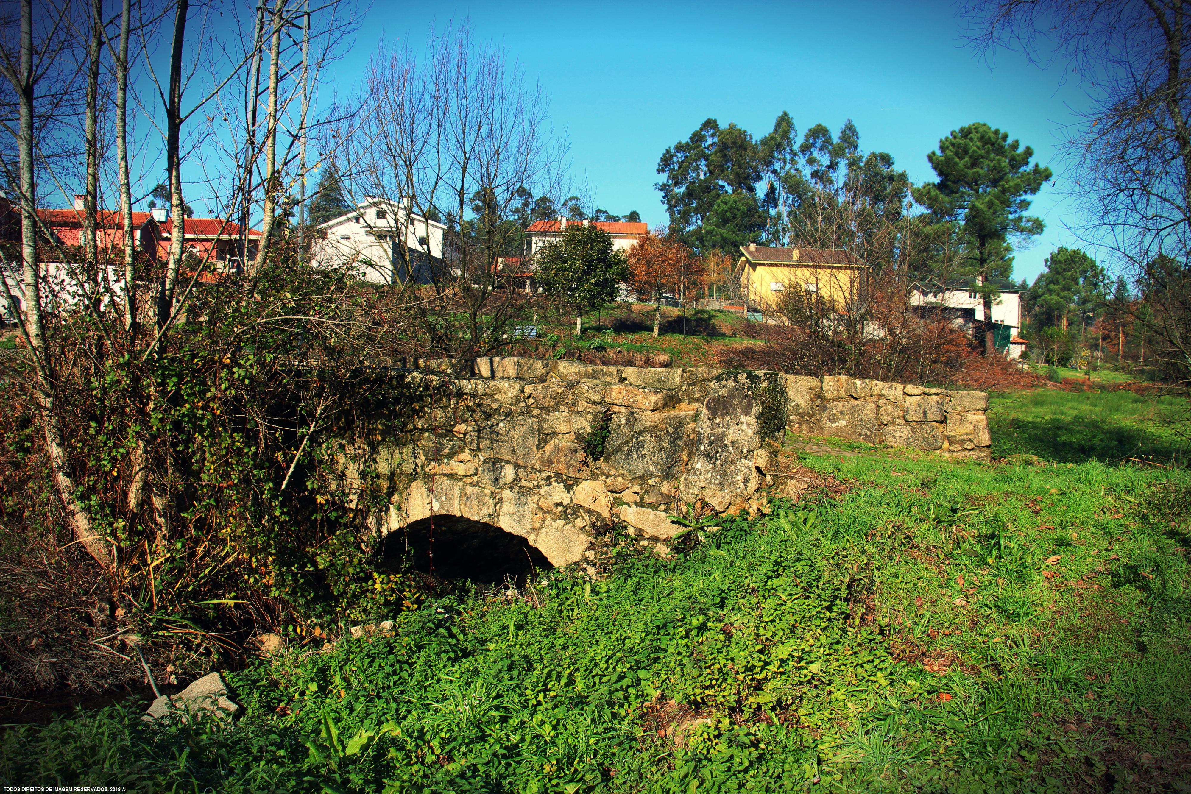 Ponte Romana em Argoncilhe